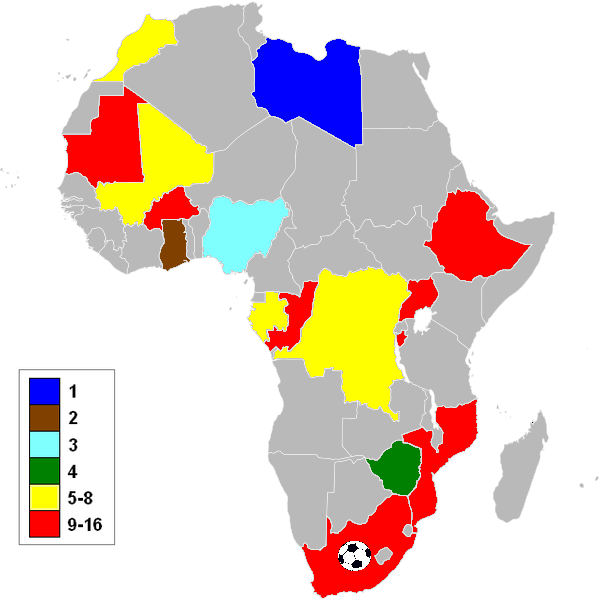 Selecciones clasificadas para el Campeonato Africano de Naciones de 2014